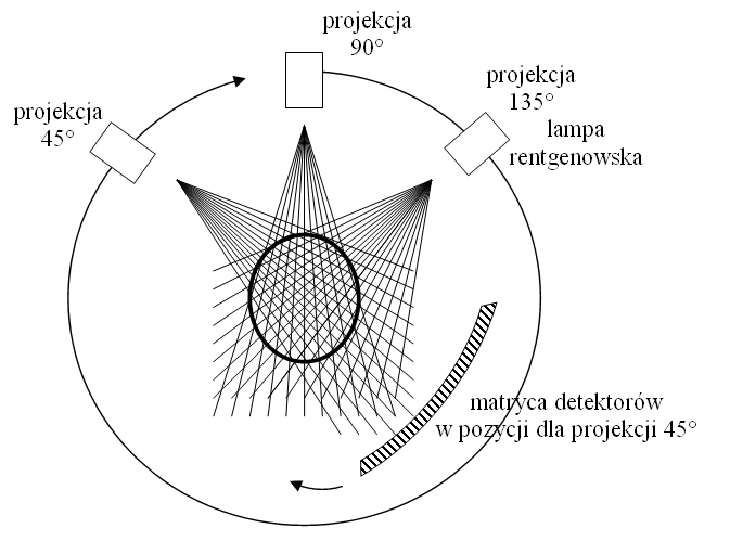 Schematyczne przedstawienie zasady działania tomografu III generacji.